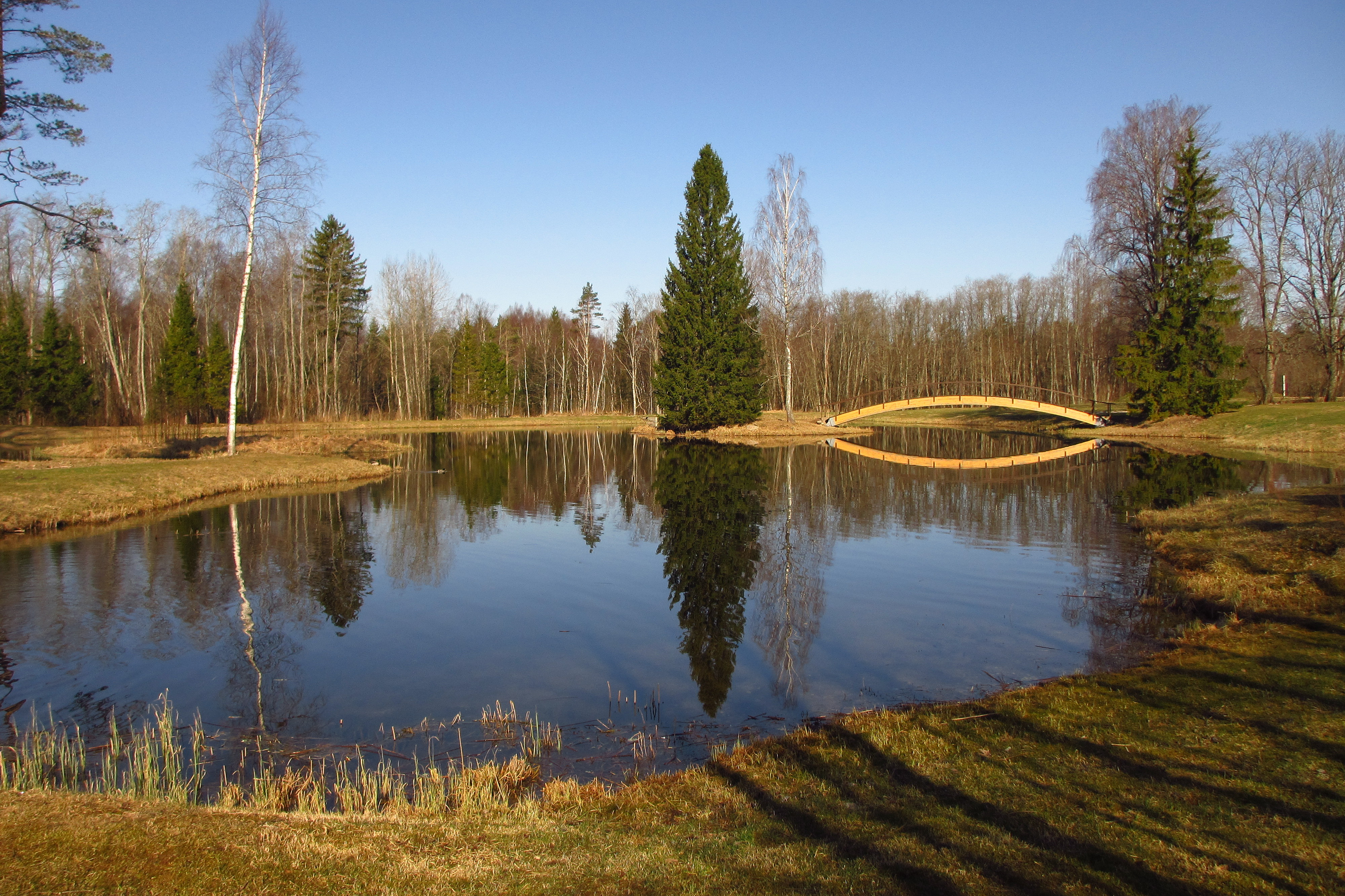 Lümandu maastikukaitseala